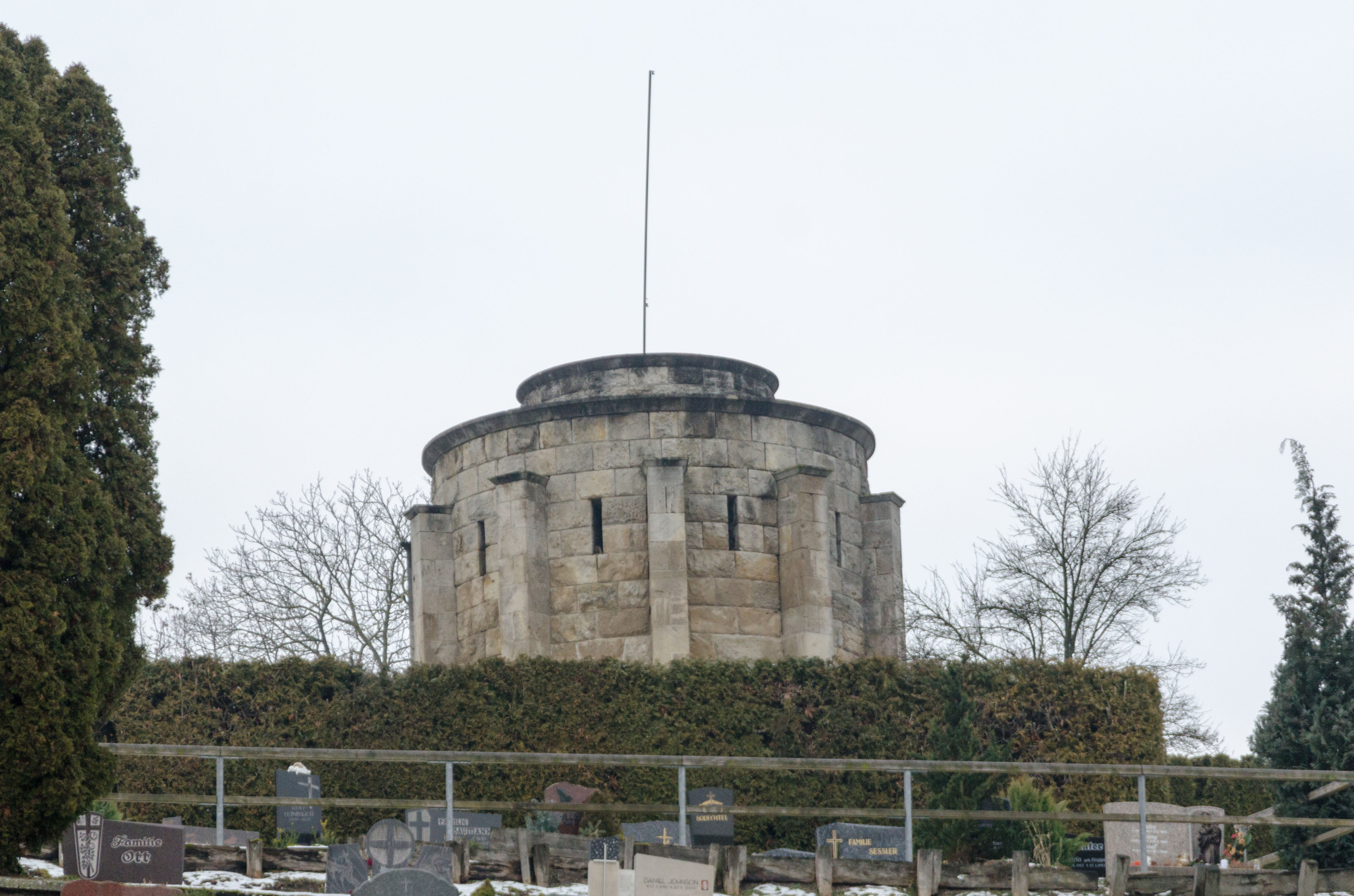 Burgbernheim, Kapellenberg, Kriegerdenkmal